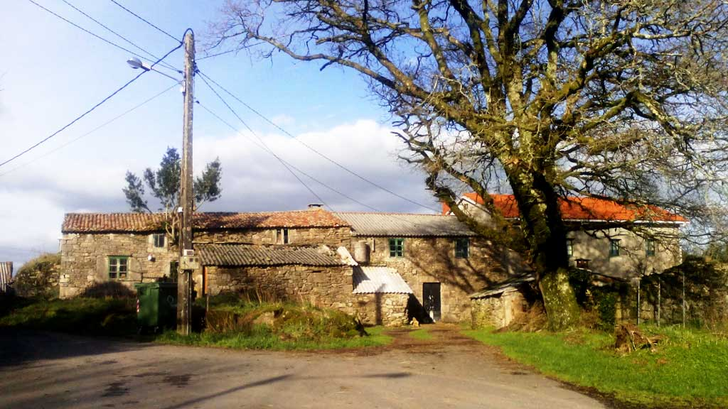 Vista da Corte do Mato.